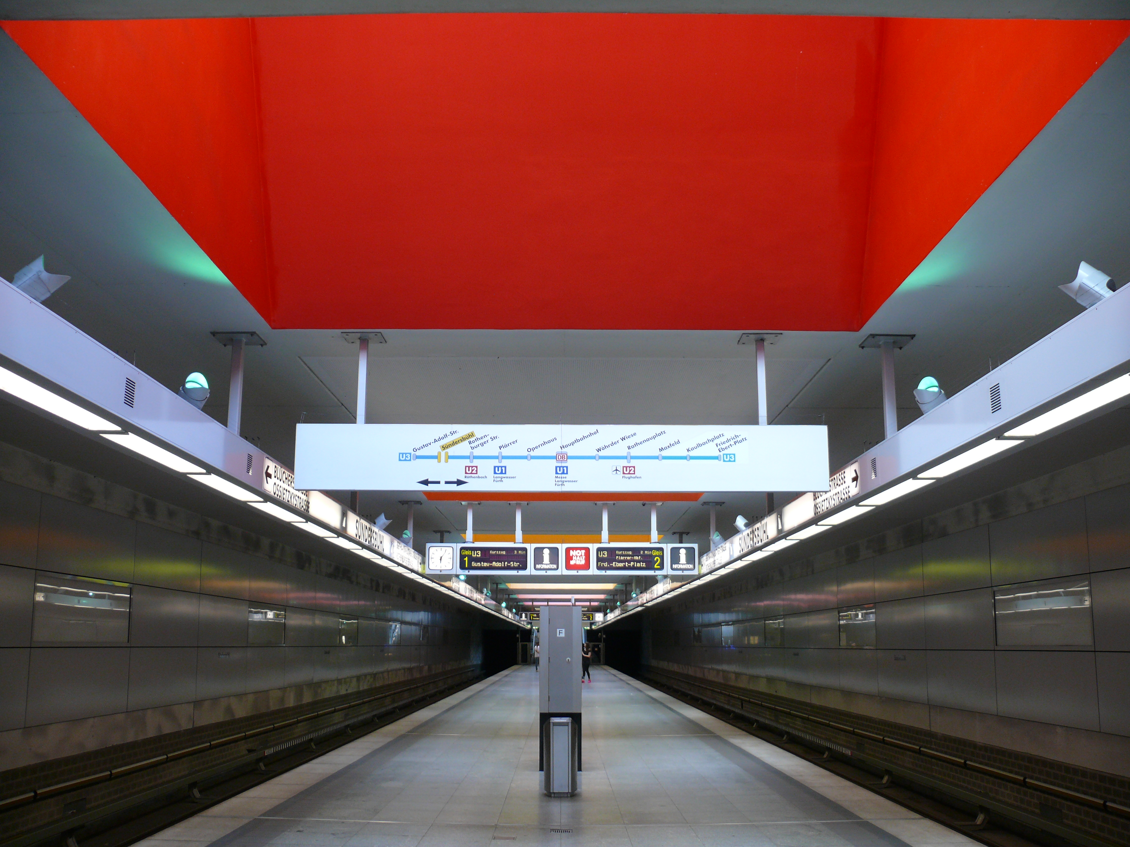 Bahnsteigebene, mit 7 farbigen Oberlichtern, am U-Bahnhof Sündersbühl in Nürnberg.